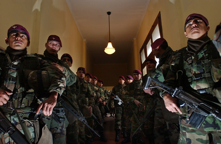 Efectivos del Regimiento de Asalto Aéreo 601, pertenecientes al EJÉRCITO ARGENTINO